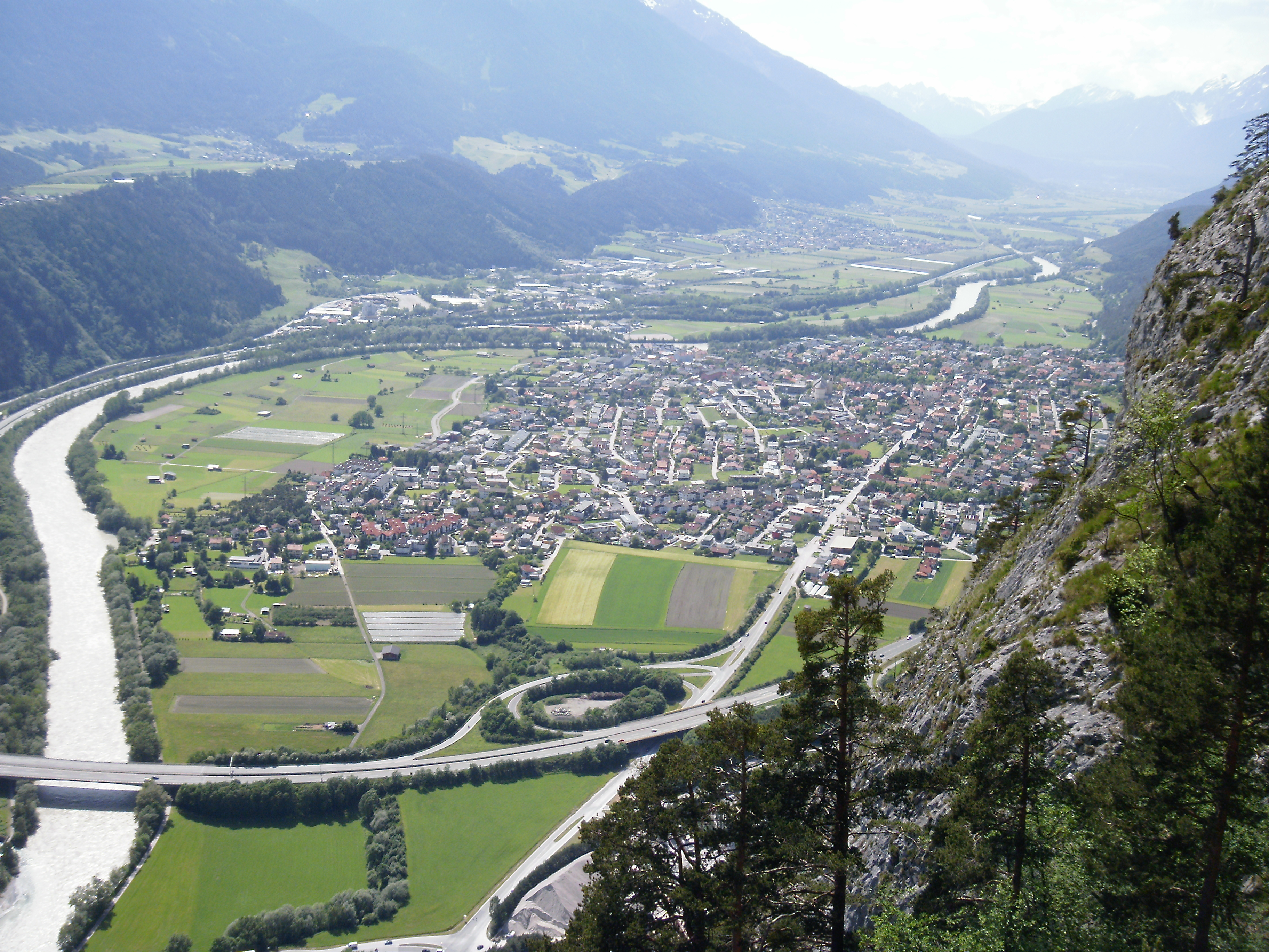 Zirl von der Martinswand